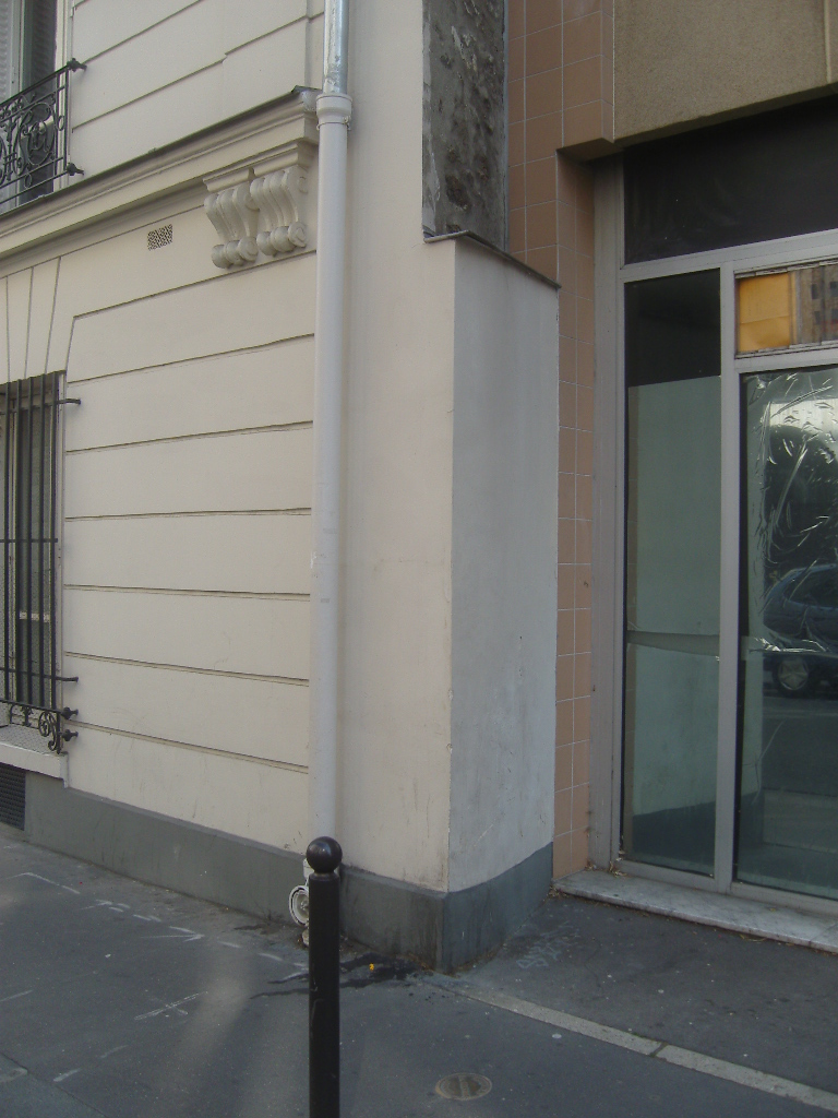 Paris 13e arrondissement - rue de la Colonie n° 48 - ancien mur central mitoyen de la Bièvre